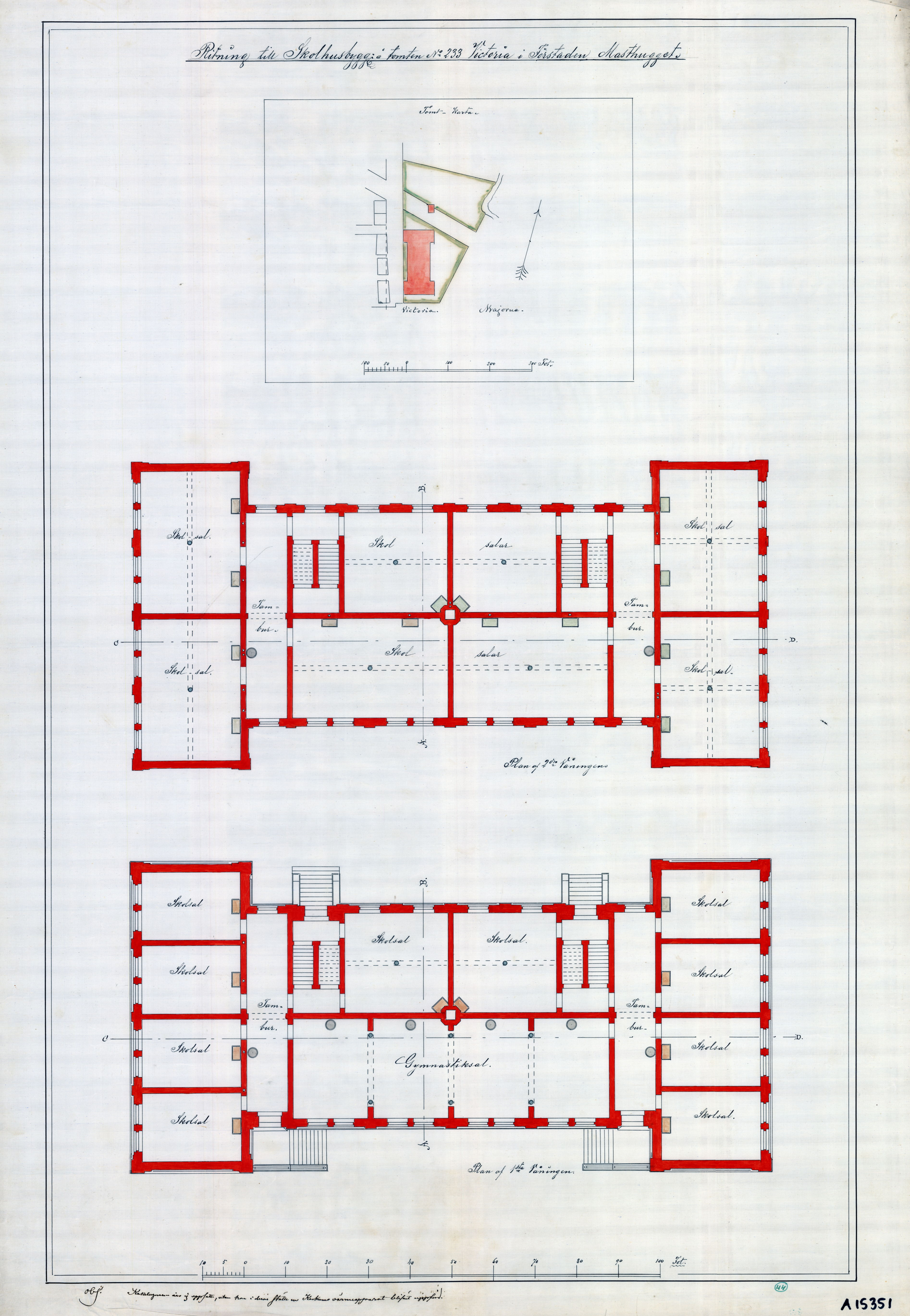 Byggnadsritning till Viktoriaskolan i Göteborg, från mitten av 1870-talet. Våning 1 och 2. Övriga våningsplan syns på File:Viktoriaskolan (ritning 15353).jpg.